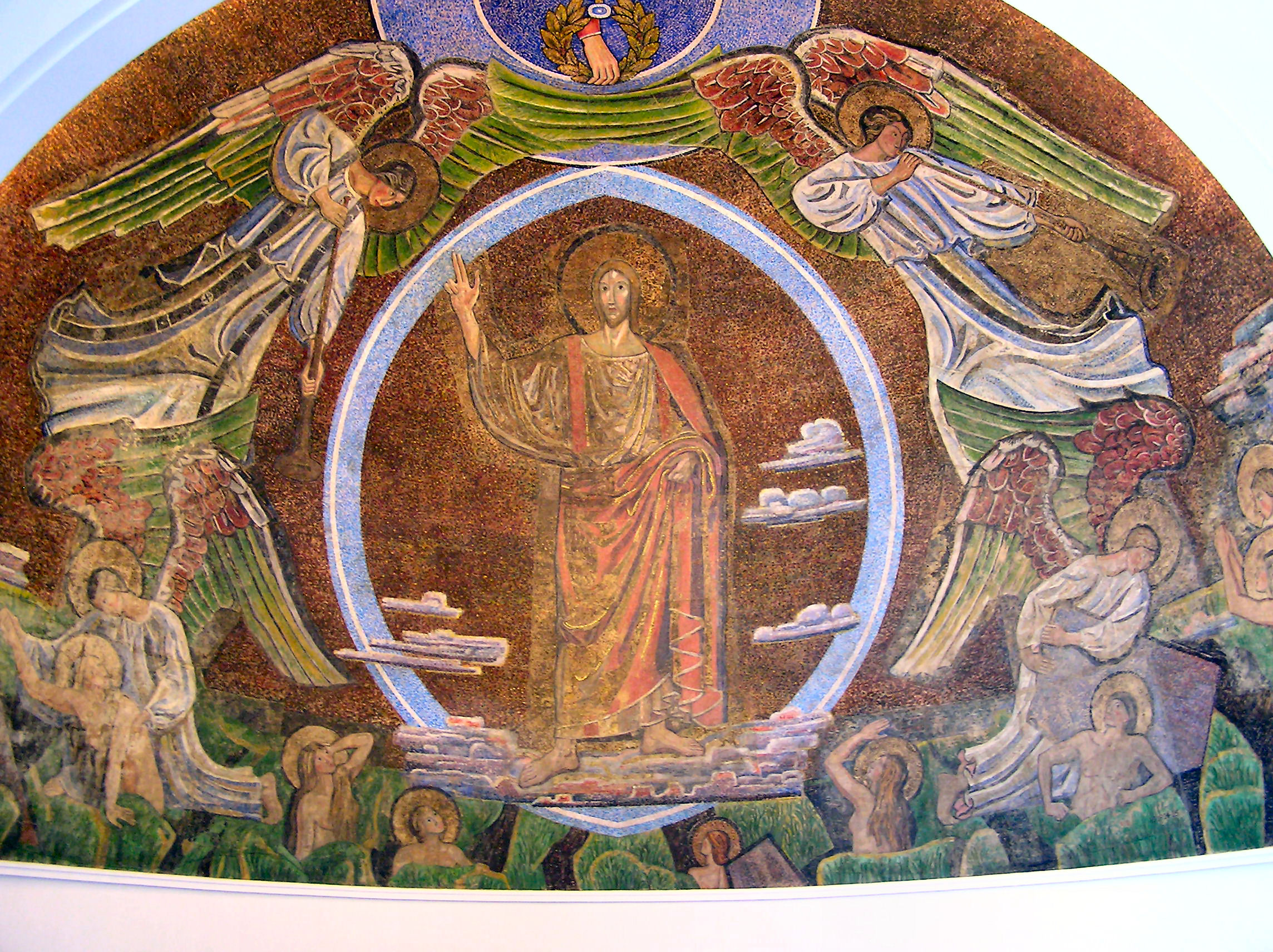 Joakim Skovgaard: Opstandelsen, karton til absismosaik i Lunds Domkirke, Malmöhus